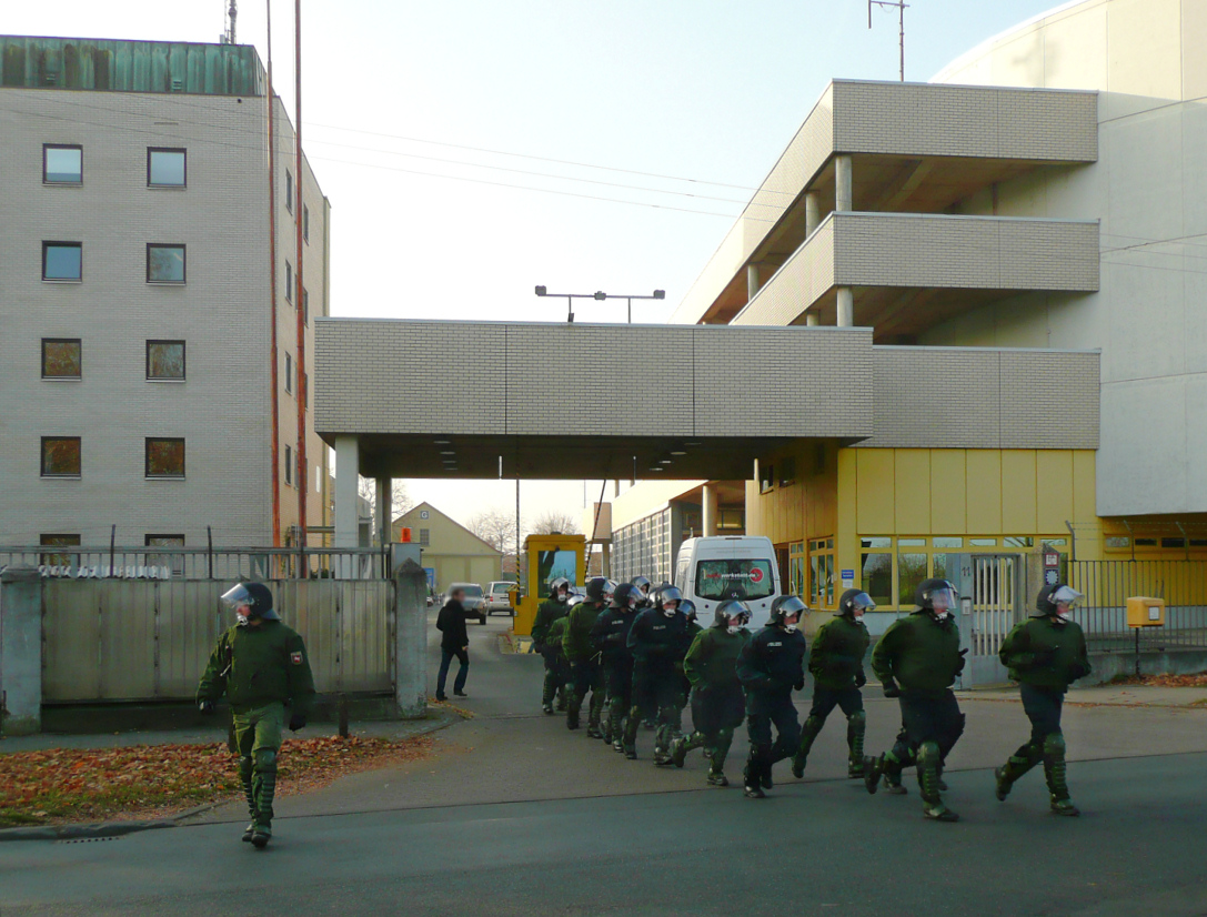 Eingang der ZPD in Hanover der Landespolizei Niedersachsen